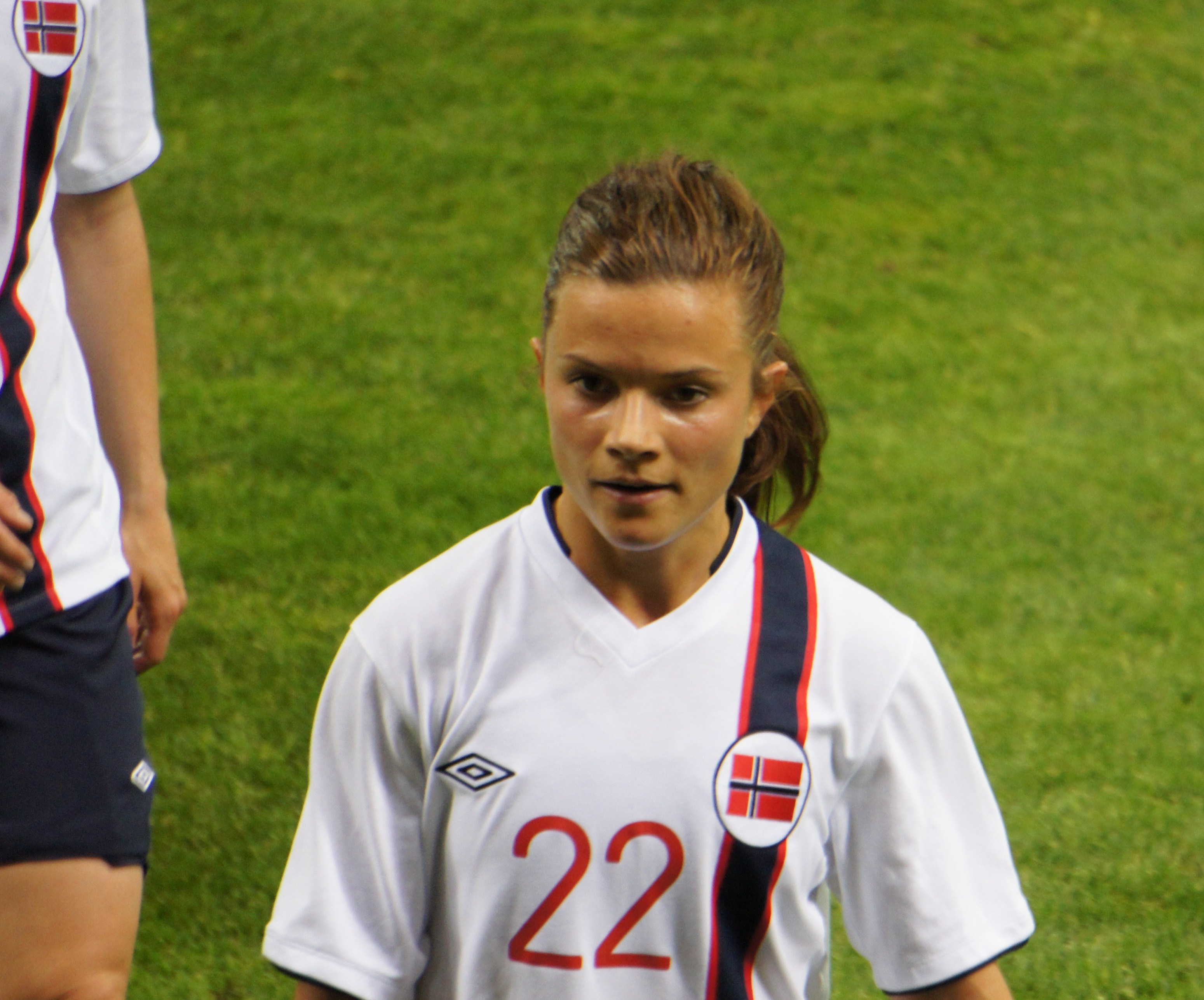 Catherine_Hoegh_Dekkerhus En équipe de Norvège.